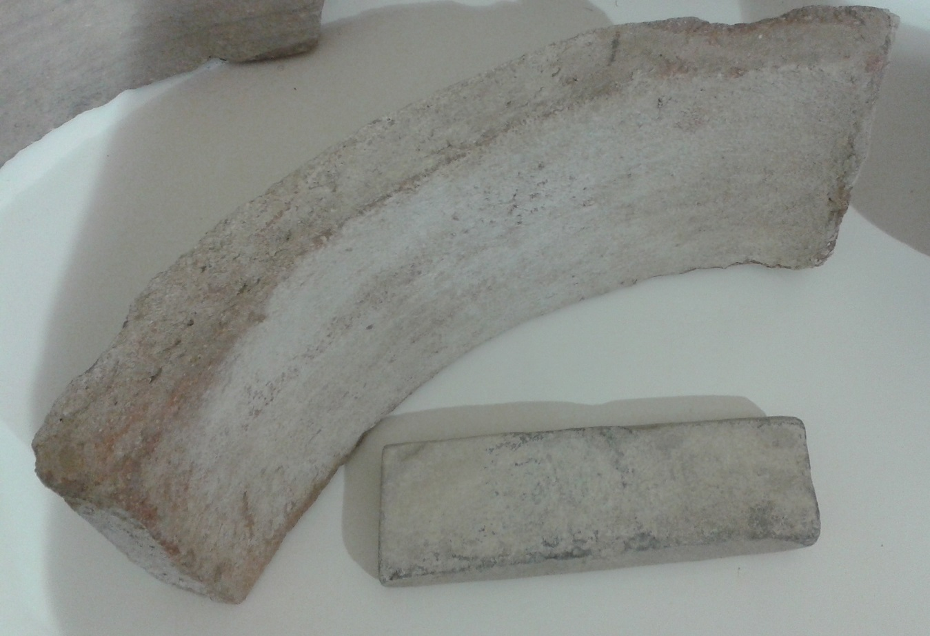 Peces de ceràmica utilitzades en la construcció de mines d'aigua.